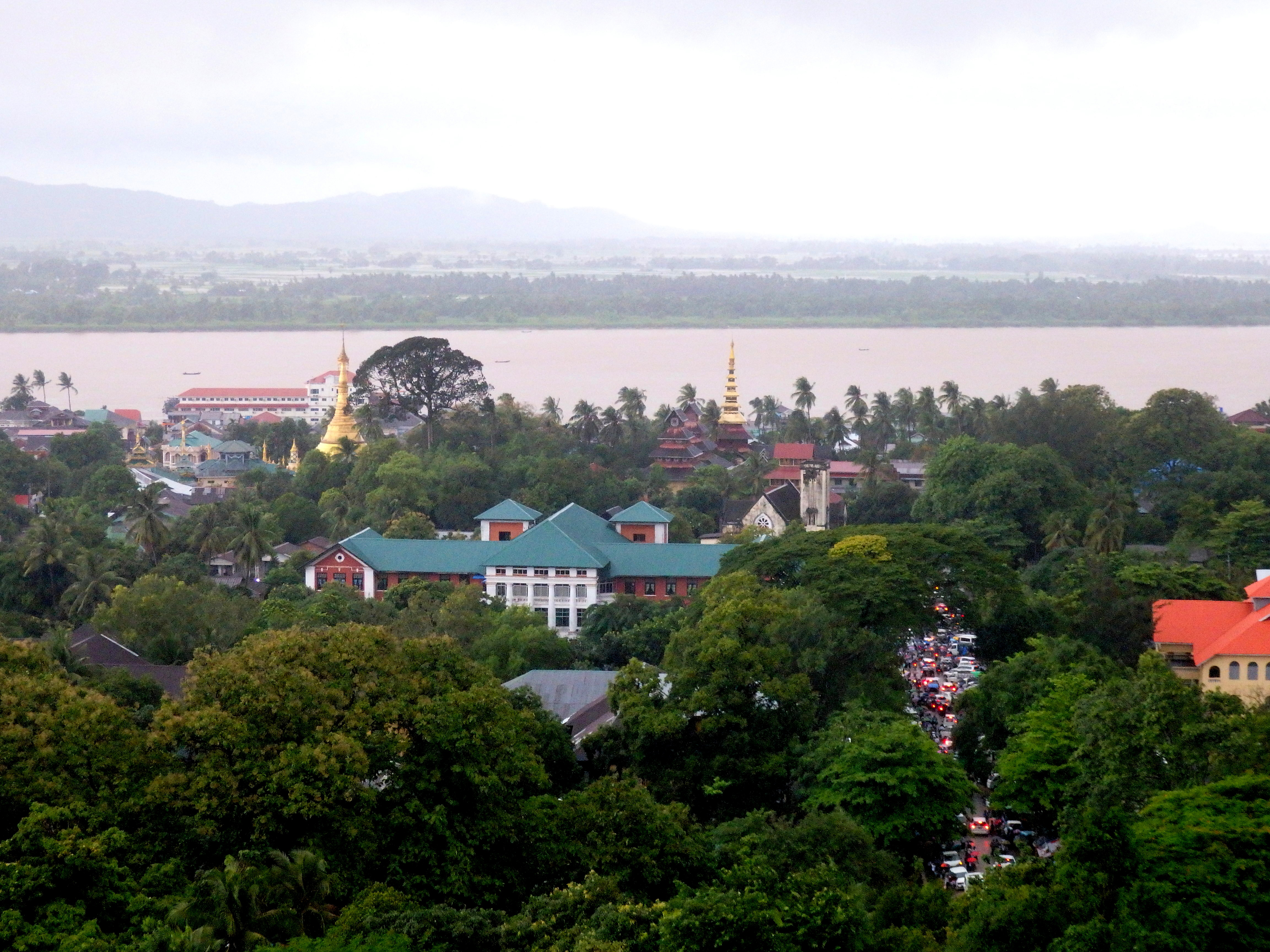 Mawlamyine MMR011001701, Myanmar (Burma)